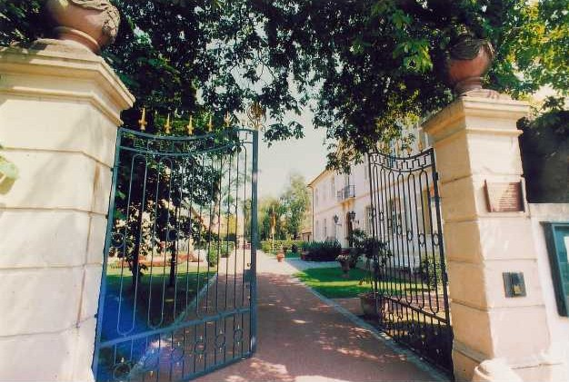 Schloss Rimsingen in Oberrimsingen